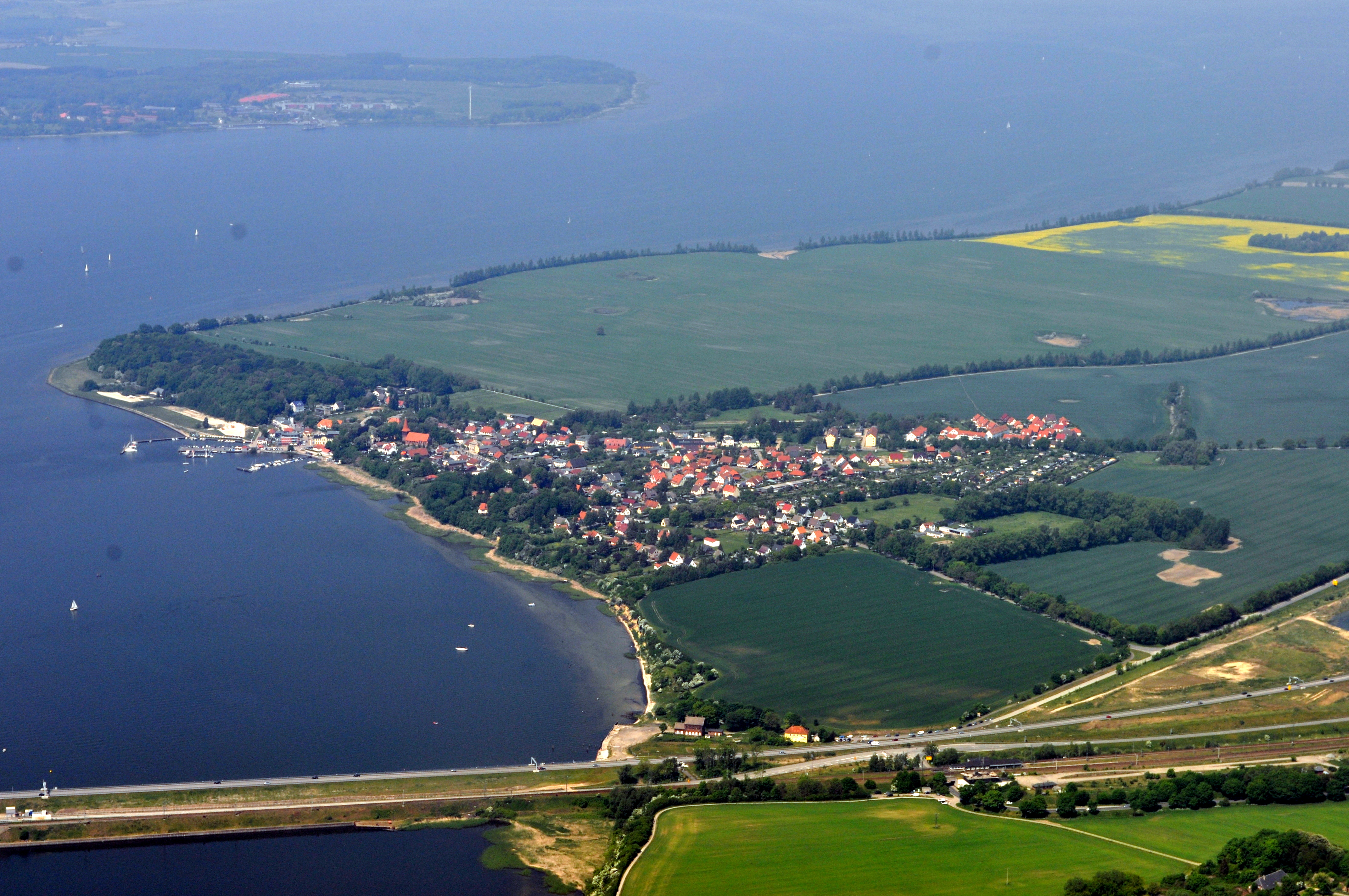 Die Bilder wurden von mir während eines einstündigen Rundflugs ab Flugplatz Güttin am 21. Mai 2011 aufgenommen. Die Bildbeschreibung steht im Dateinamen. Aufgenommen mit einer Nikon D5000 durch das Seitenfenster des Flugzeugs.